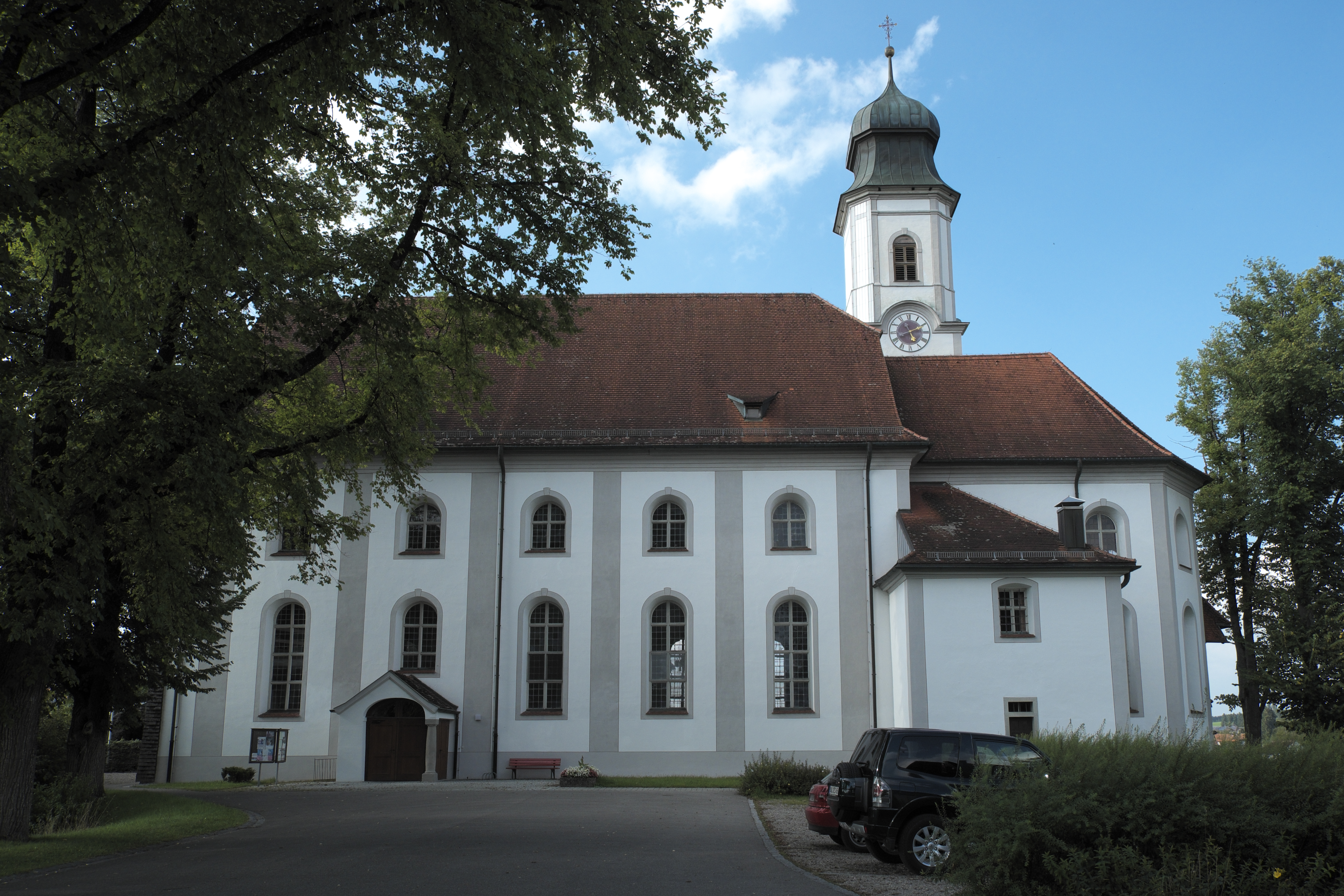 Katholische Pfarrkirche Mariä Heimsuchung in Lechbruck am See im Landkreis Ostallgäu (Bayern/Deutschland)